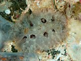 Tayuva lilacina, a 6 m, Osezaki, Japón